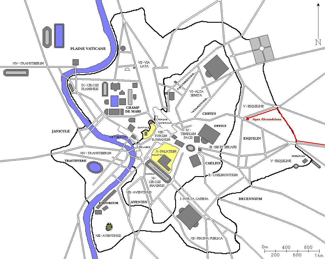 Plan de Rome avec l'aqua Alexandriana en rouge